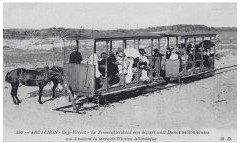 Cap Ferret - Depart du Tramway pour l'Ocean - Une baladeuse Decauville (Coll. R. Duton)